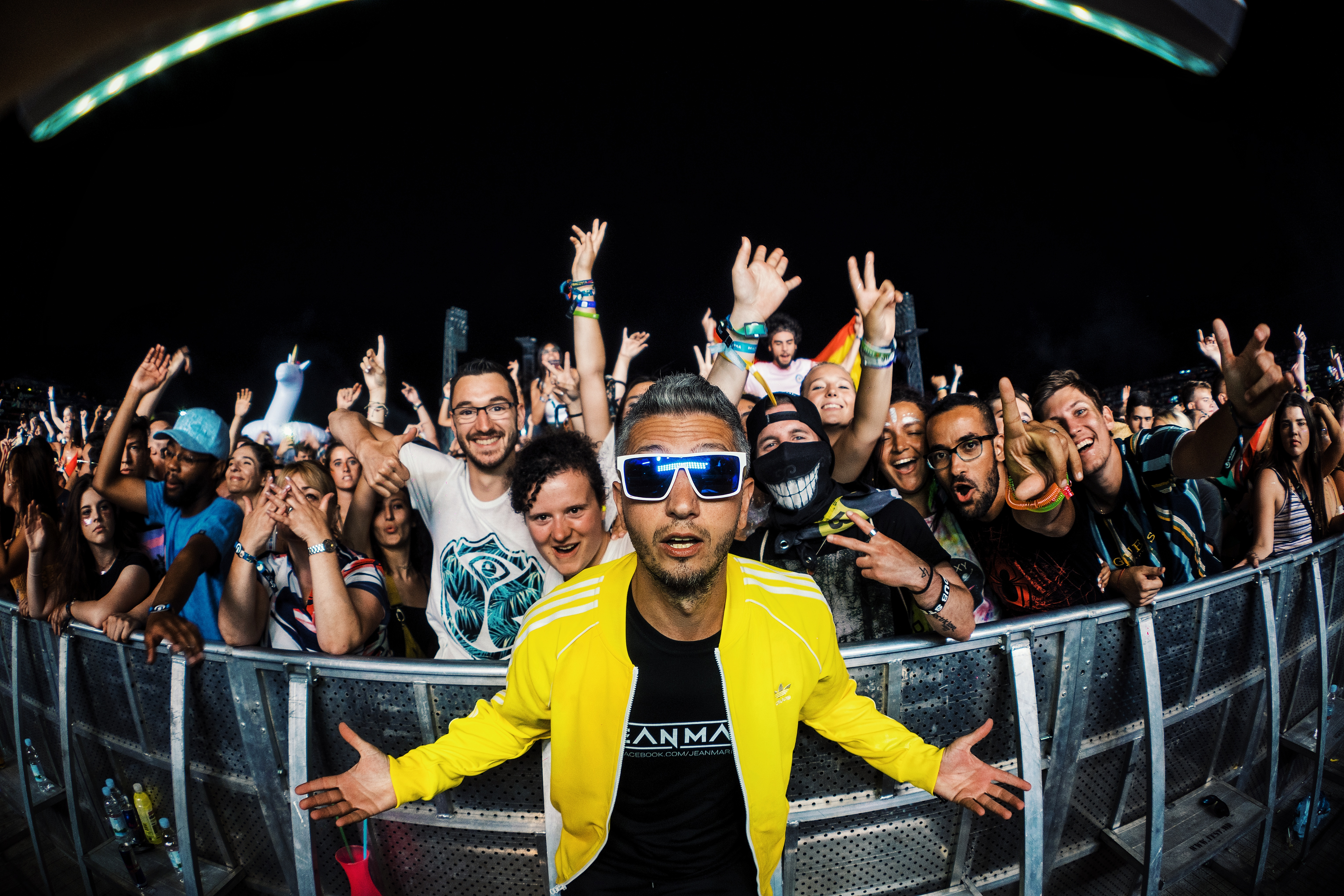 JEAN MARIE